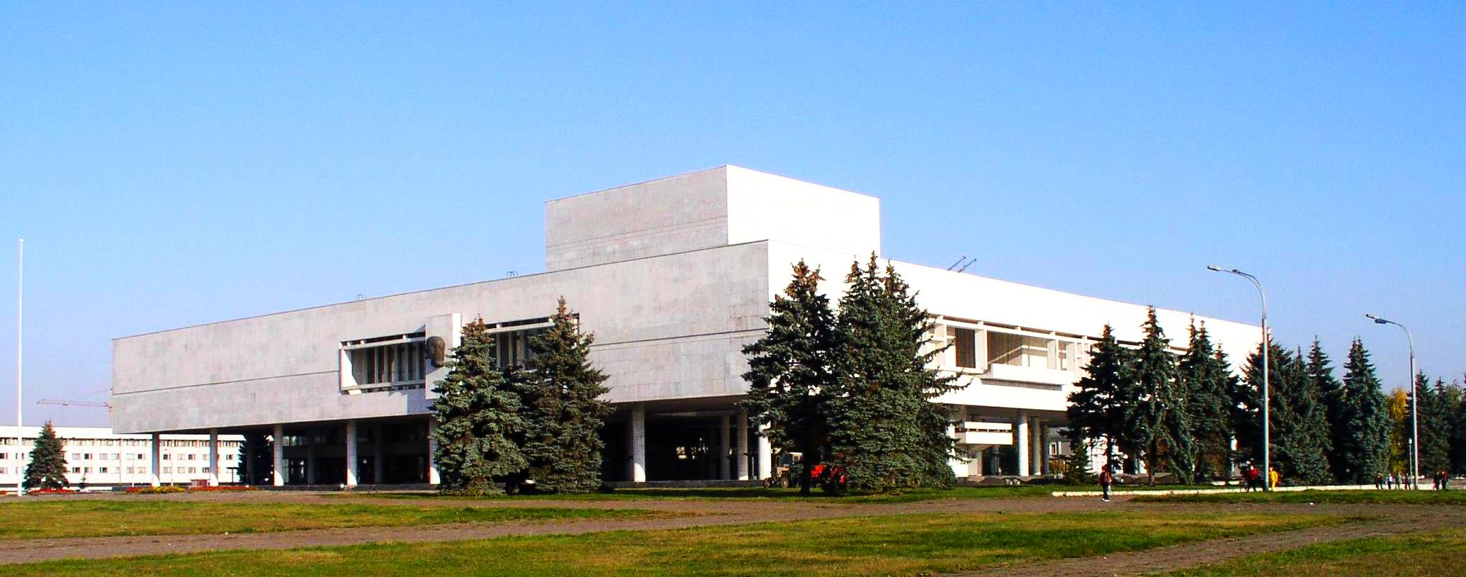 Мемориальный центр Ленина